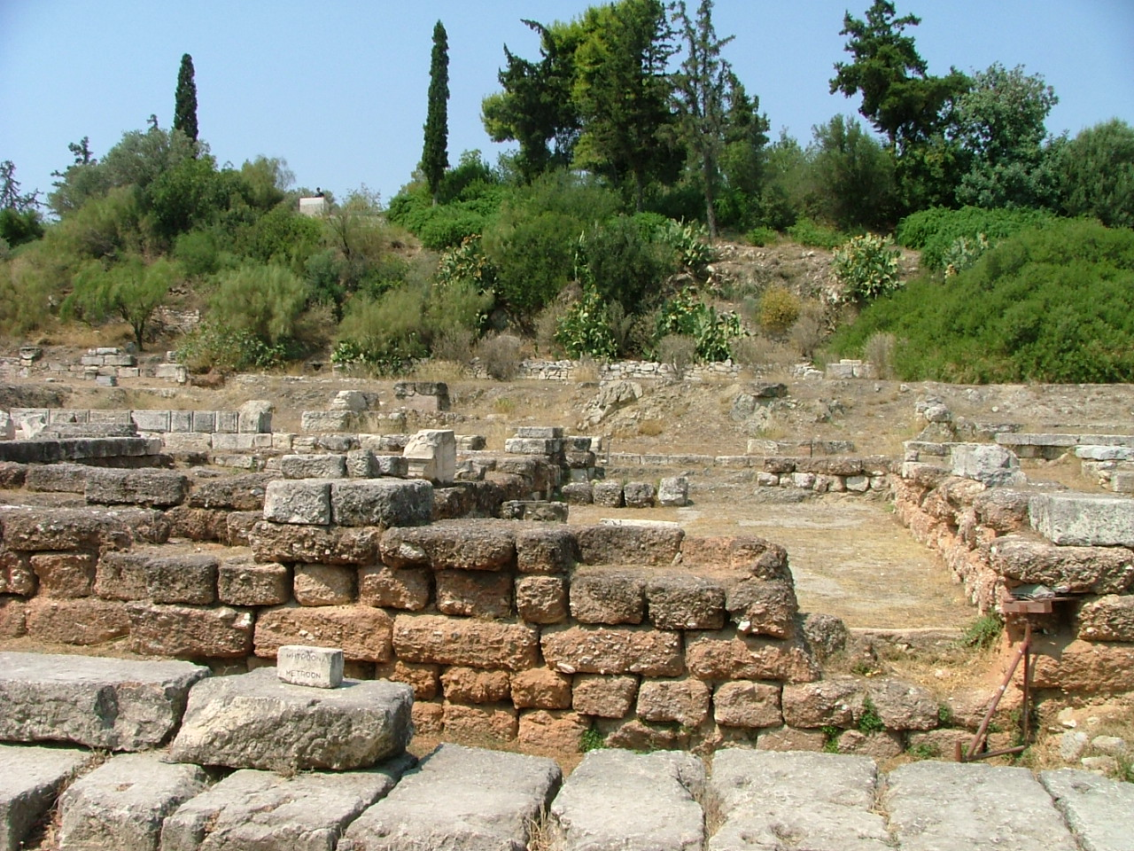 Metroon del Ágora de Atenas.